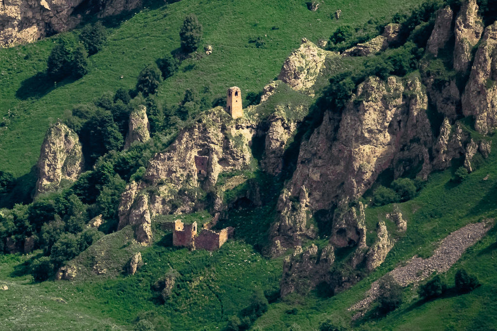 Башенный комплекс в древнем ингушском городе-поселении Хай (Джейрахский район, Ингушетия)